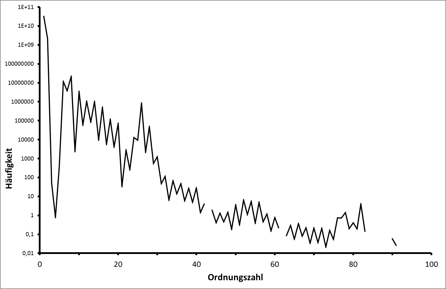 Häufigkeit chemischer Elemente im Universum